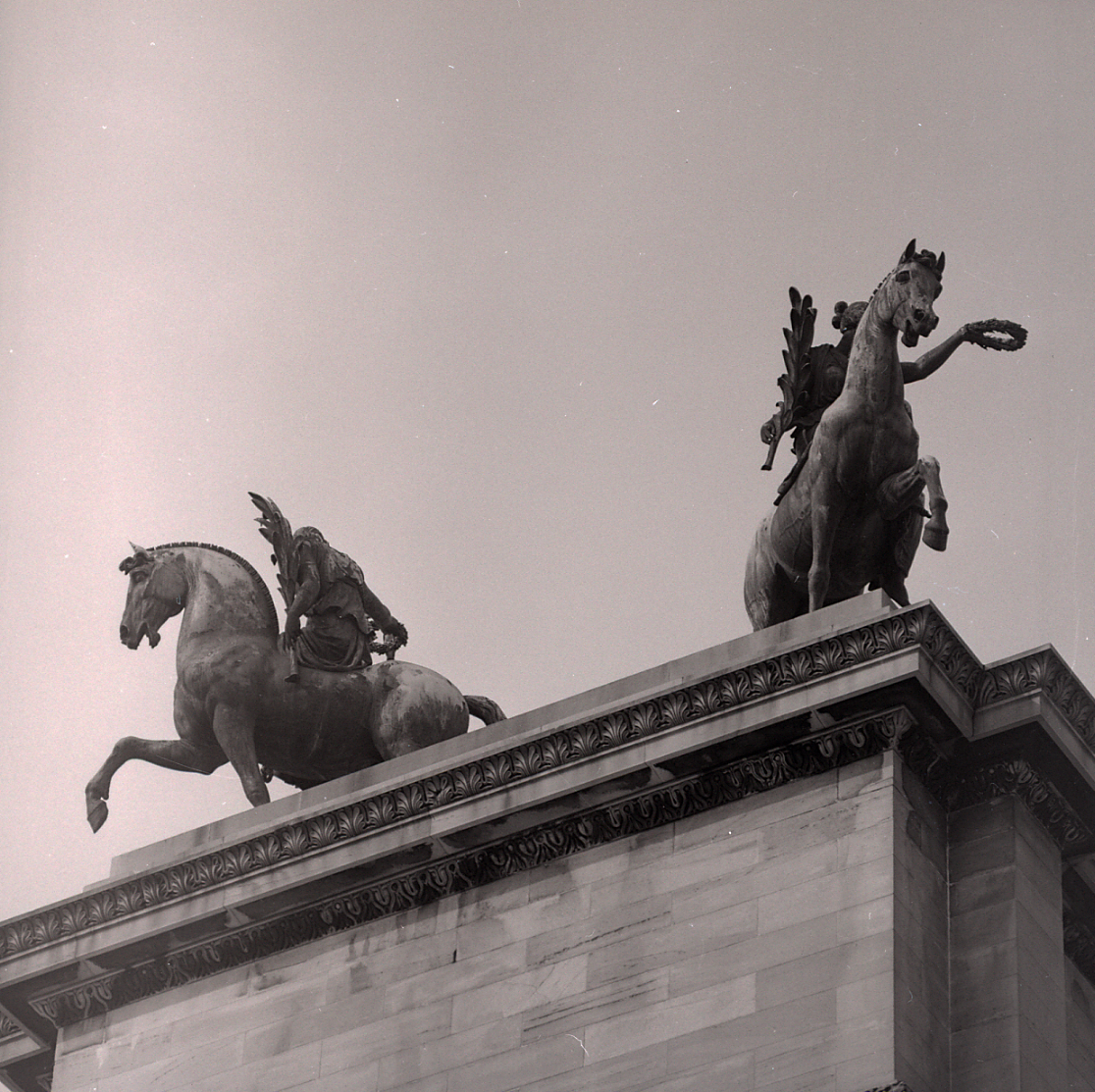 Serie fotografica : Milano, 1970 / Paolo Monti. - Buste: 1, Fototipi: 8 : Negativo b/n, gelatina bromuro d'argento/ pellicola ; 6x6. - ((Serie costituita da 8 negativi identificati con i nn.: 7634-7641. La suddetta serie è contenuta nella scatola identificata con la numerazione R7429-7677. Sul coperchio della scatola manoscritto: "Milano". Sulla busta manoscritto: "Arco della Pace. 250mm Hasselblad R7634/41"